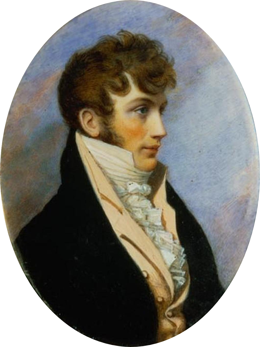 Benjamin Bathurst (*1784; verschwunden 1809). Britischer Diplomat. Zeitgenössisches Porträt des frühen 19. Jahrhunderts, Künstler unbekannt.